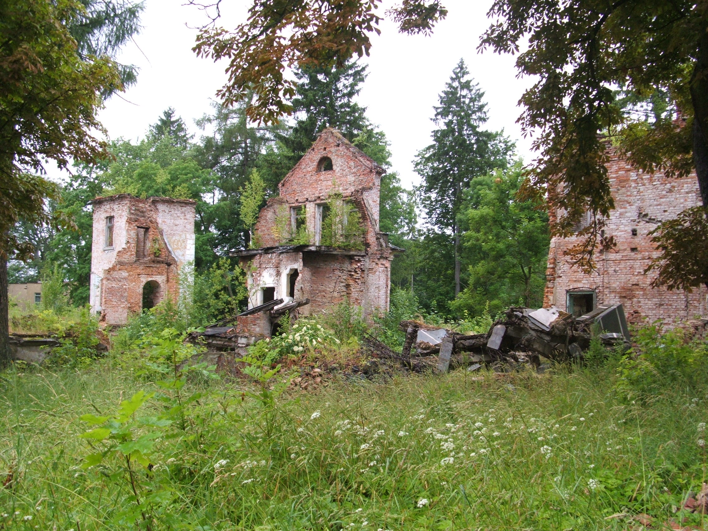 Jasień, resztki dworu